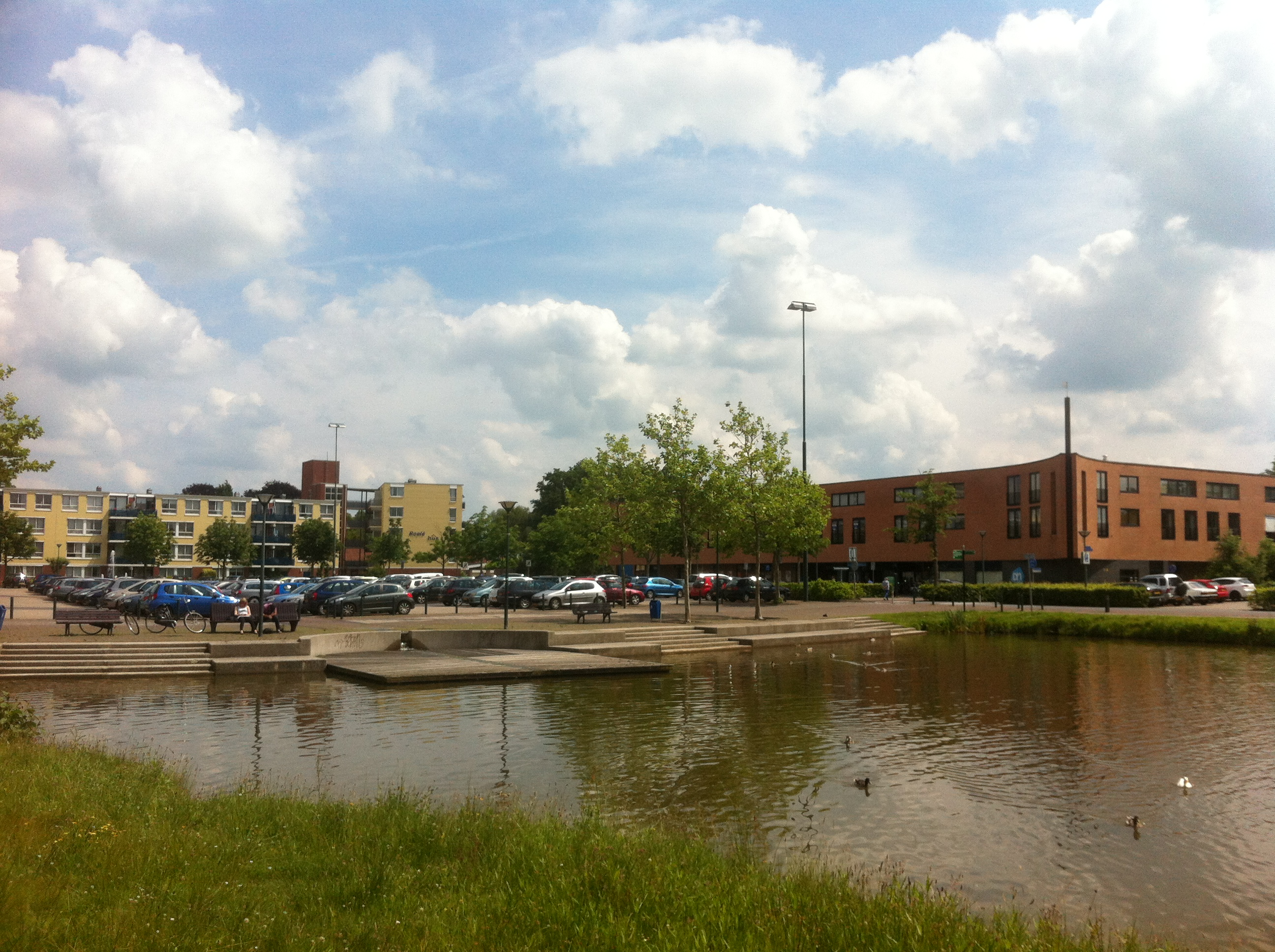 Het Kiryat Onoplein in Drachten